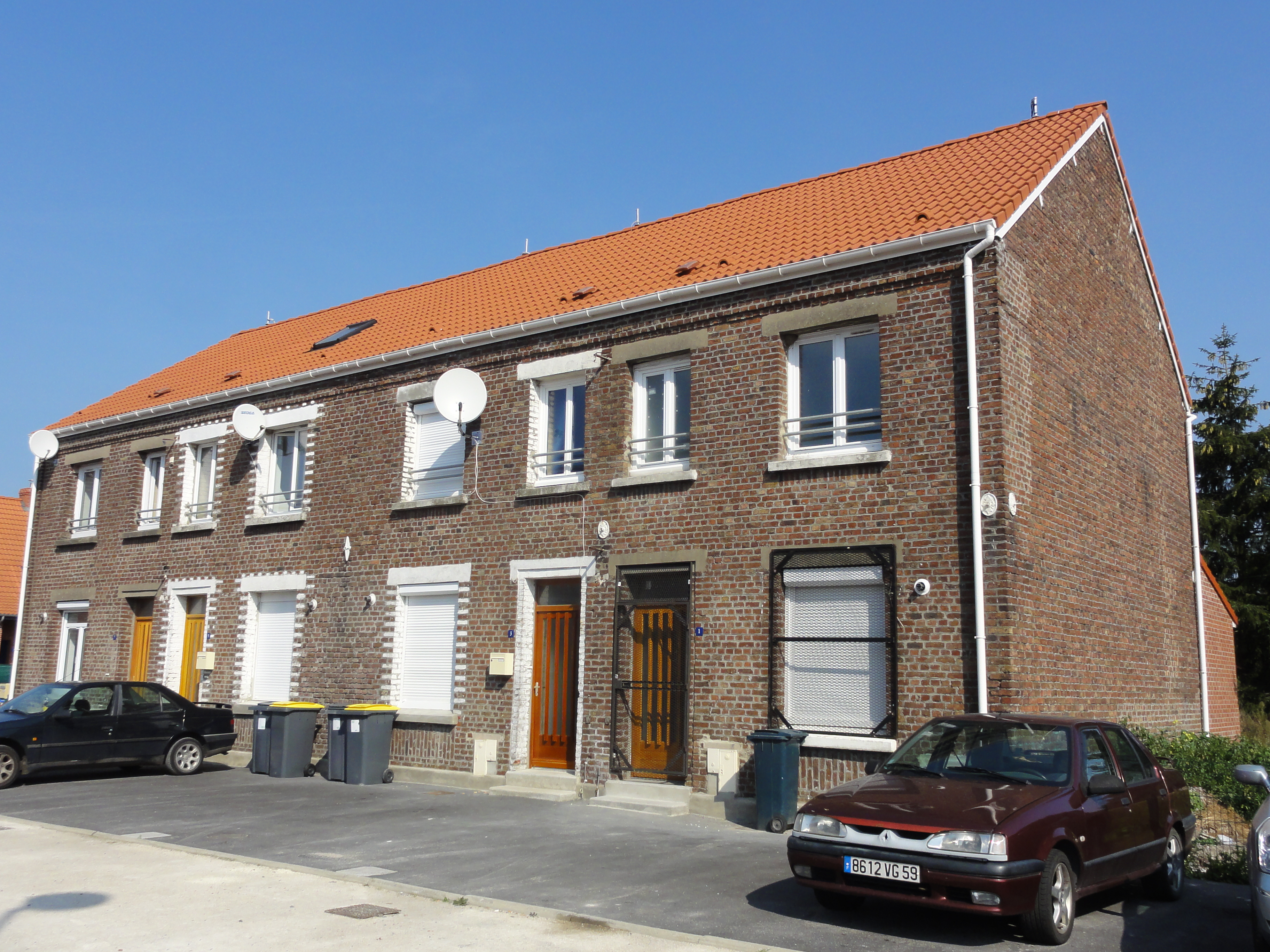 Cité de la Perche de la fosse Saint-Pierre de la Compagnie des mines de Thivencelle dans le bassin minier du Nord-Pas-de-Calais, Thivencelle, Nord, Nord-Pas-de-Calais, France.